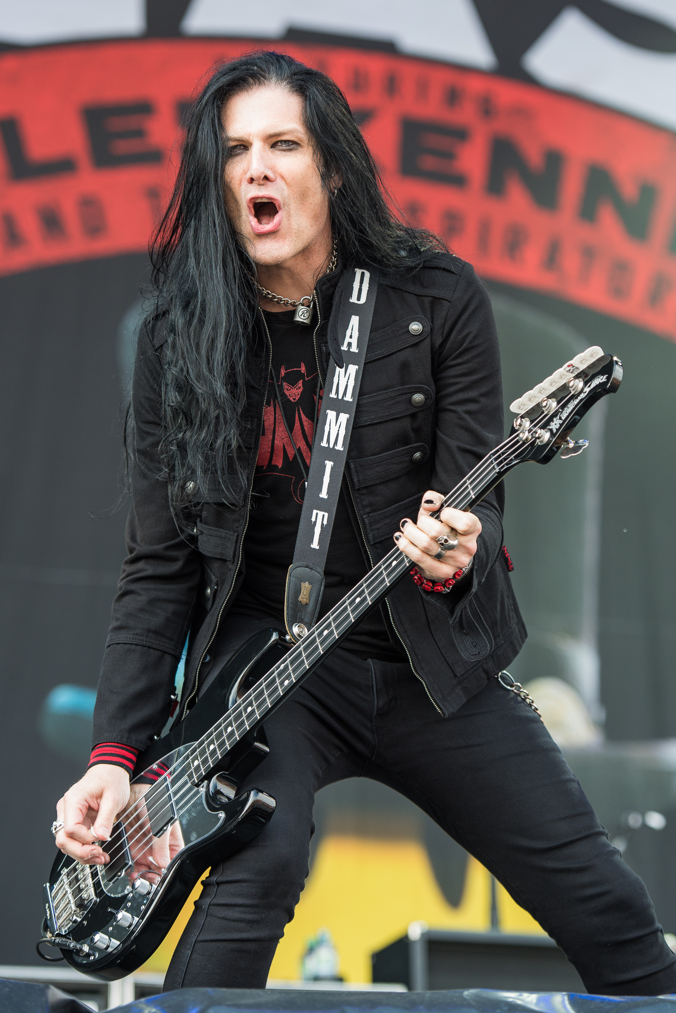 ARGO-Konzerte,Festival,Konzert,Livekonzert,Livemusik,Musik,RiP,Rock im Park 2015,Seat Zeppelin Stage,Slash feat. Myles Kennedy & The Conspirators,Todd Kerns